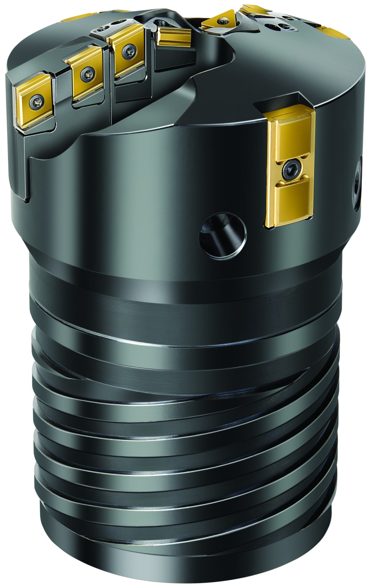 Botek BTA-Bohrkopf mit geteilter Schneide